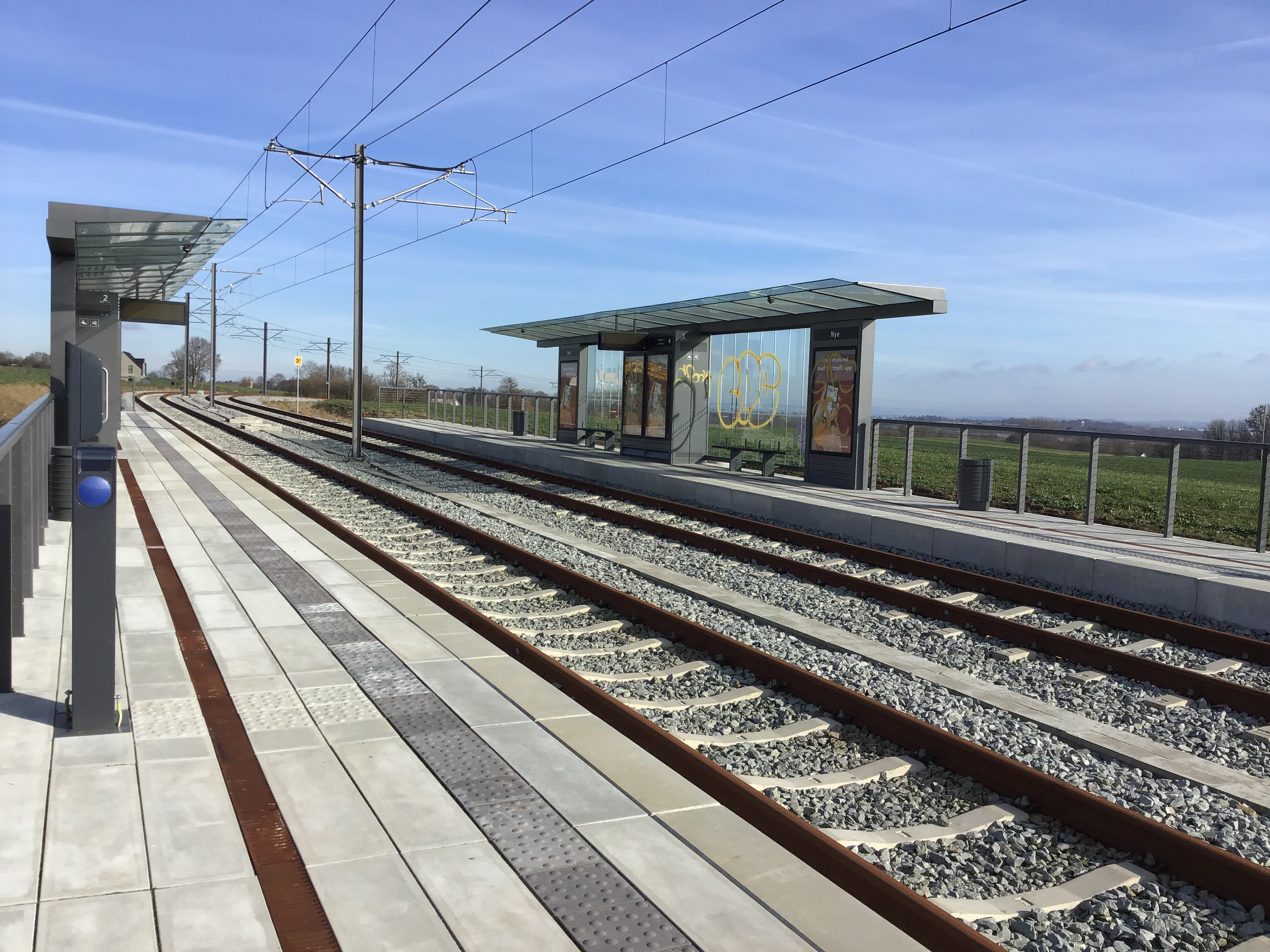 Nye Station, Århus Letbane